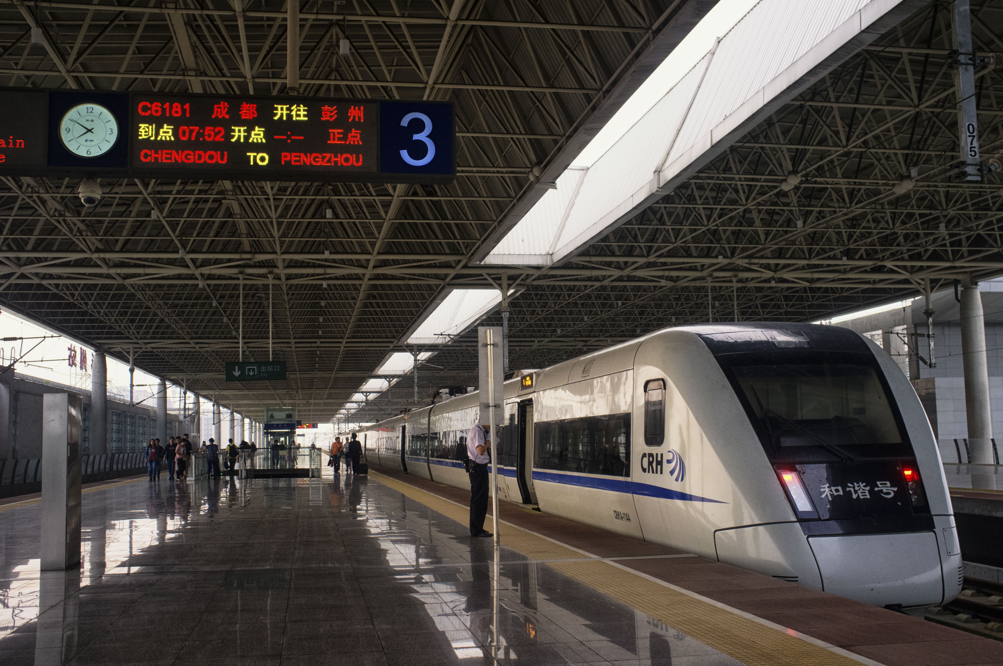 中文（中国大陆）: CRH1A停靠在彭州站站台